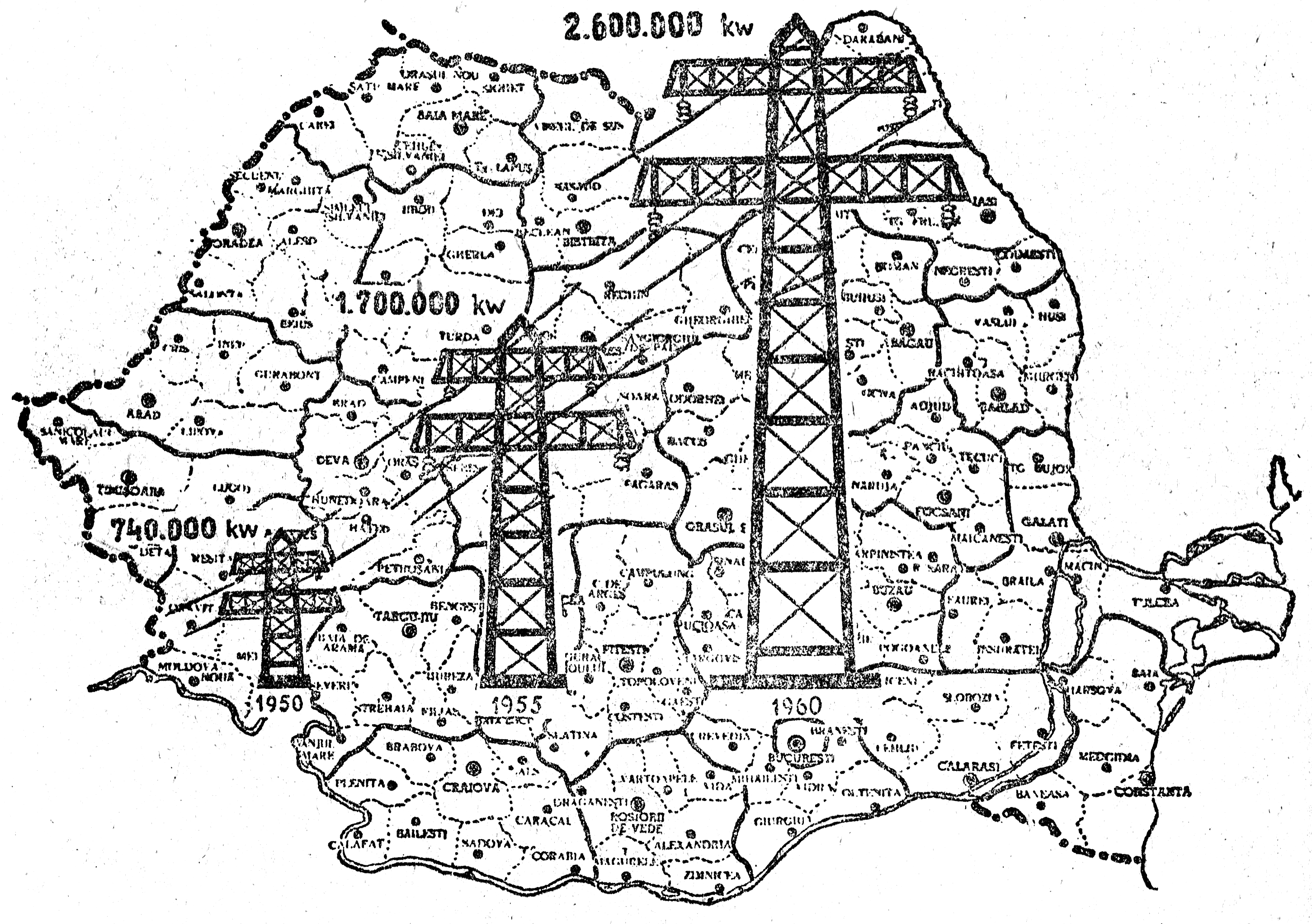 Imaginea a fost scanată din „Îndrumătorul pastoral” (1951), dintr-un articol propagandistic cu referire la procesul de electrificare a teritoriului Republicii Populare Române.